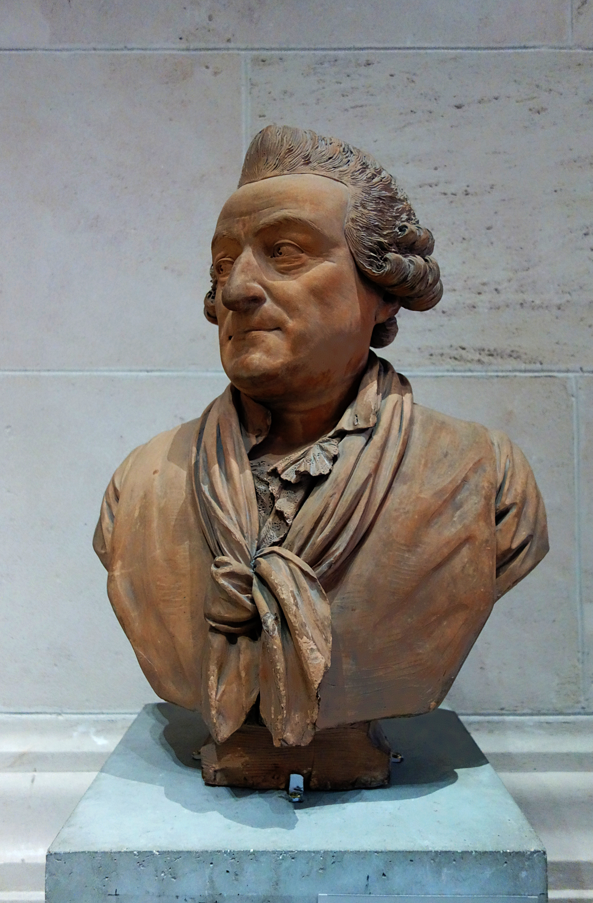 Buste de Thomas-François-Joseph Gombert, architecte, au Palais des beaux-arts de Lille.